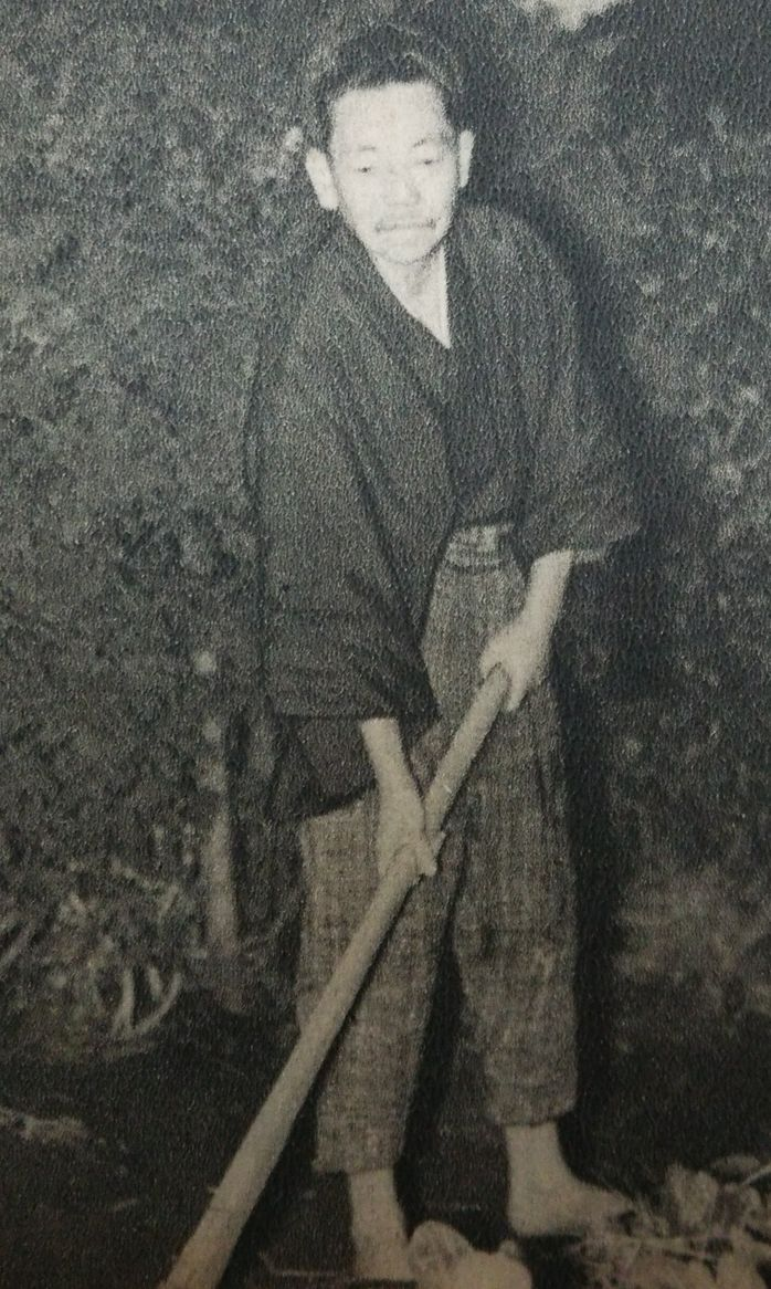 斎藤五百枝